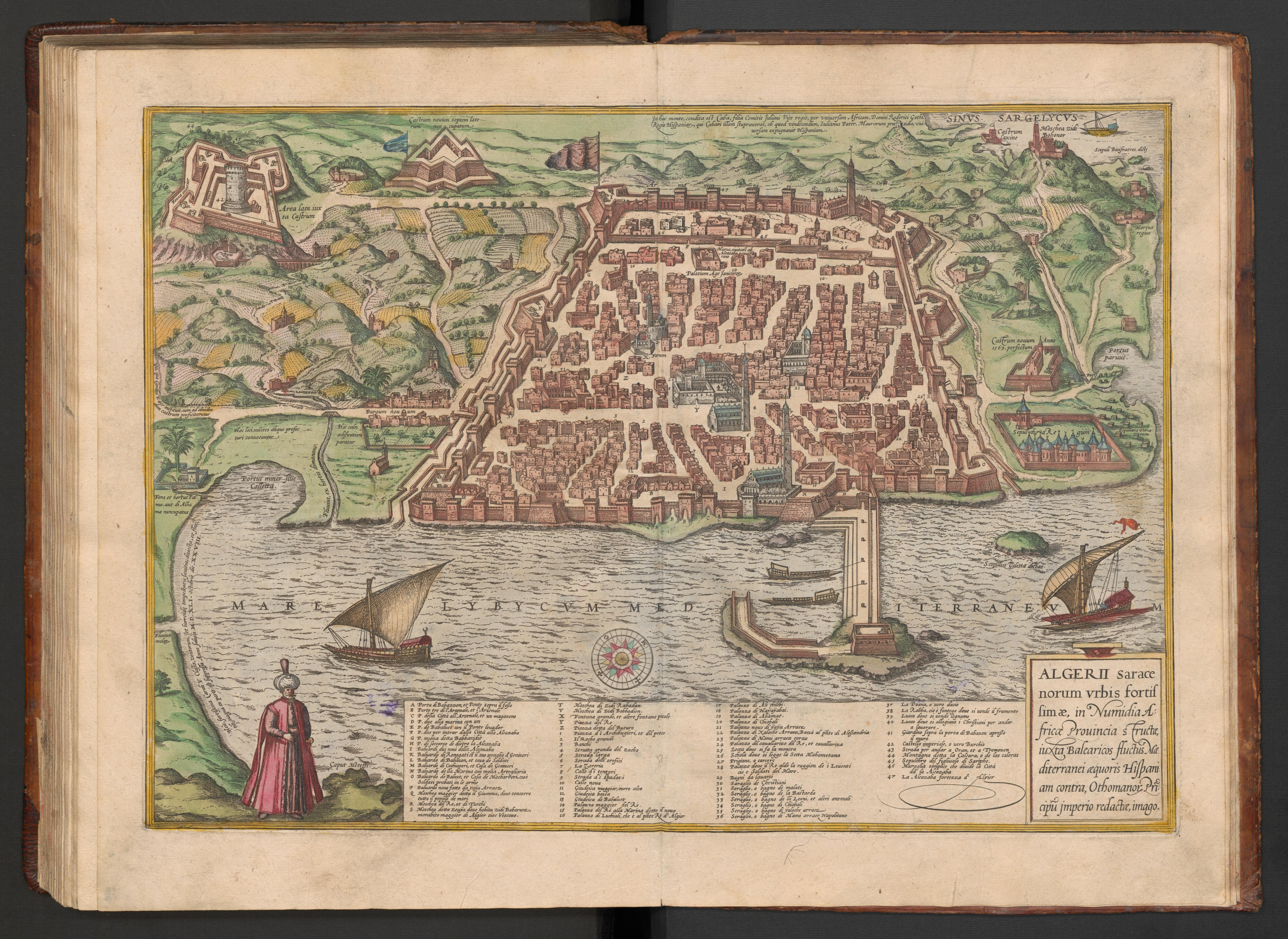 1 atlas ([20] s., 59 k. widoków i planów miast, [10] s.), mdz. kolor. Zawiera widoki, widoki z lotu ptaka i plany perspektywiczne 80 wybranych miast. Każda karta opatrzona tekstem objaśniającym na verso. Na końcu dołączony indeks miejscowości. Pierwsze łacińskie wydanie drugiego tomu "Civitates orbis terrarum".